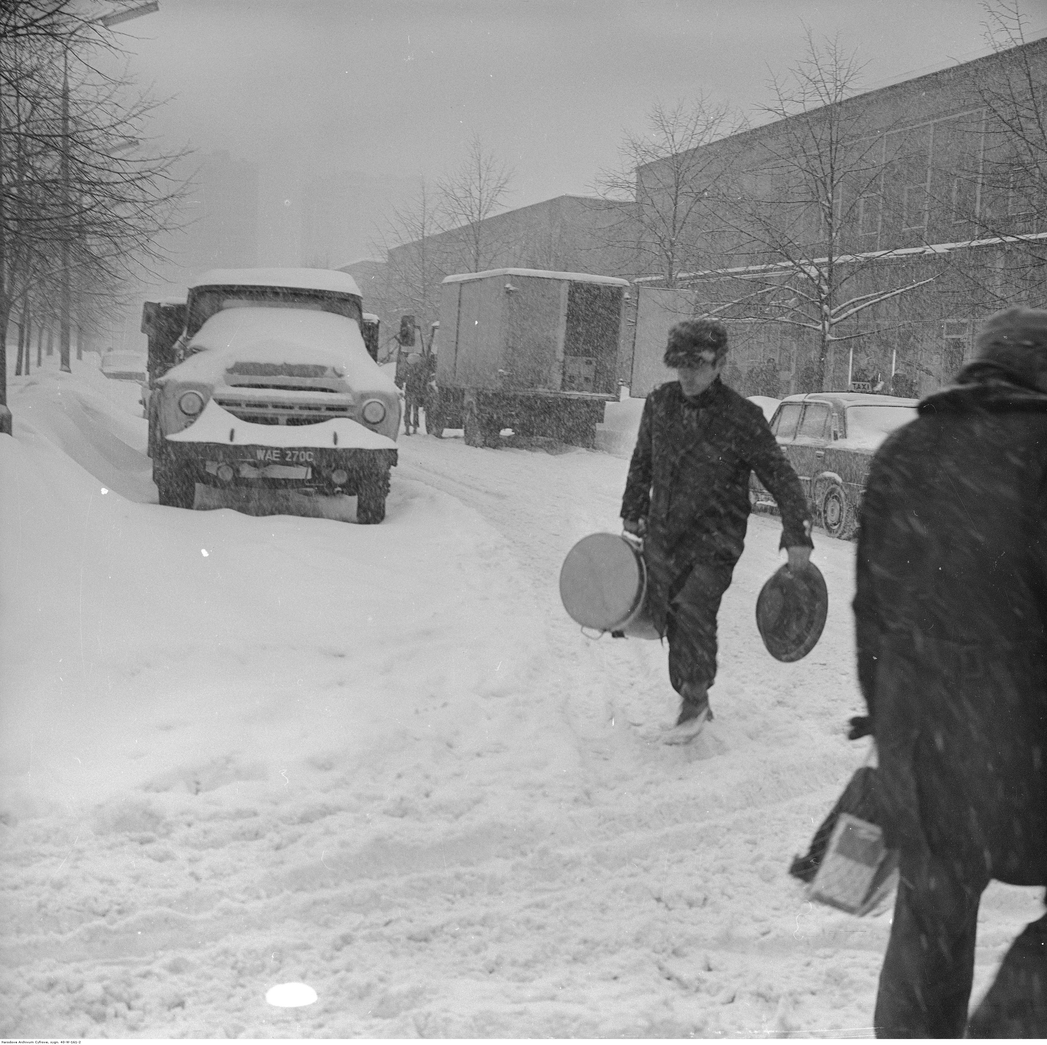 Mężczyzna z termosem obiadowym w jednej ręce i miednicą w drugiej. W tle ciężarowka zaopatrzeniowa oraz zasypana śniegiem ciężarowka ZIŁ-130 na ulicy Malczewskiego. Tzw. Zima Stulecia 1979.